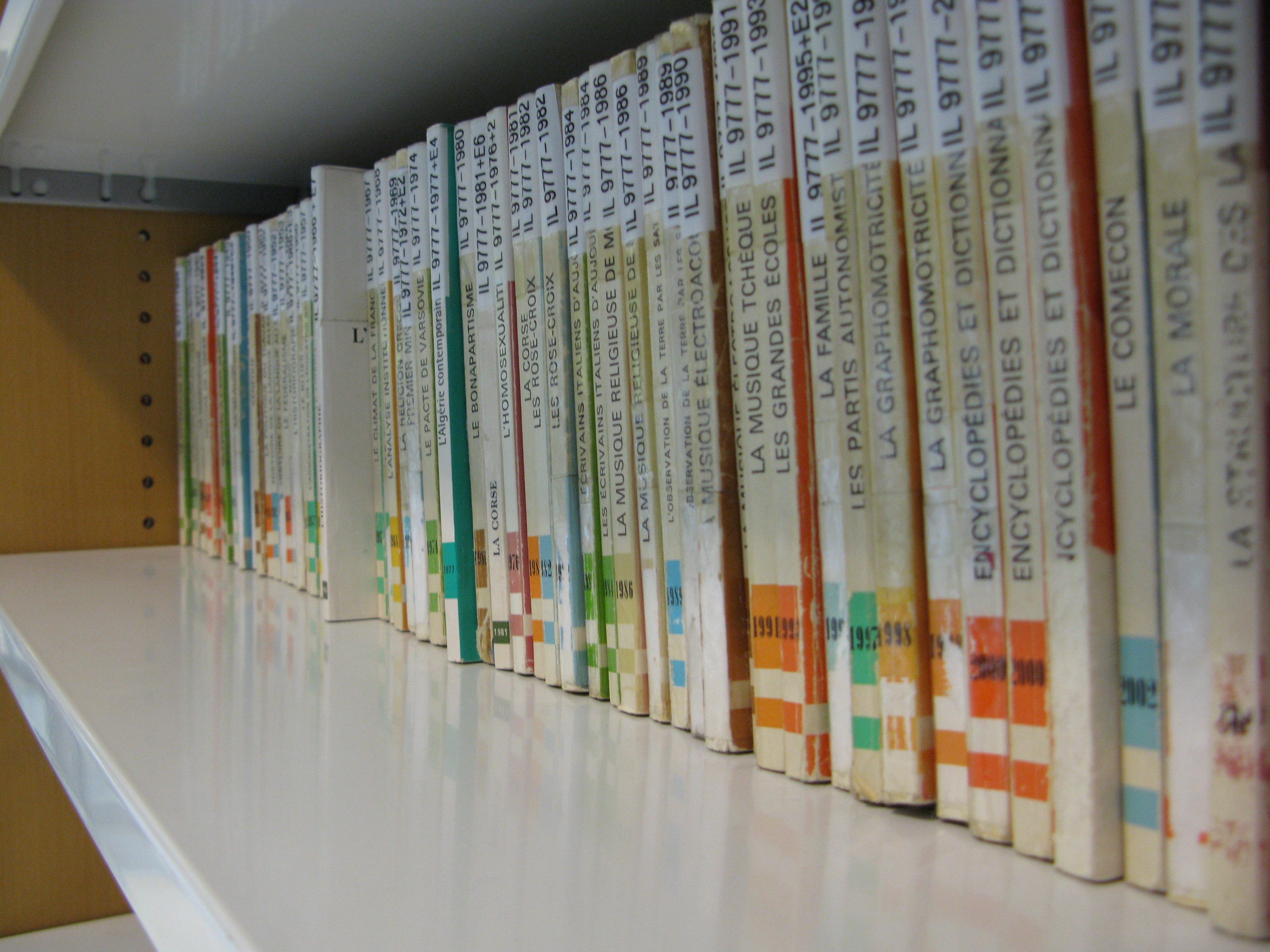 Ouvrages de la série Que sais-je dans une bibliothèque